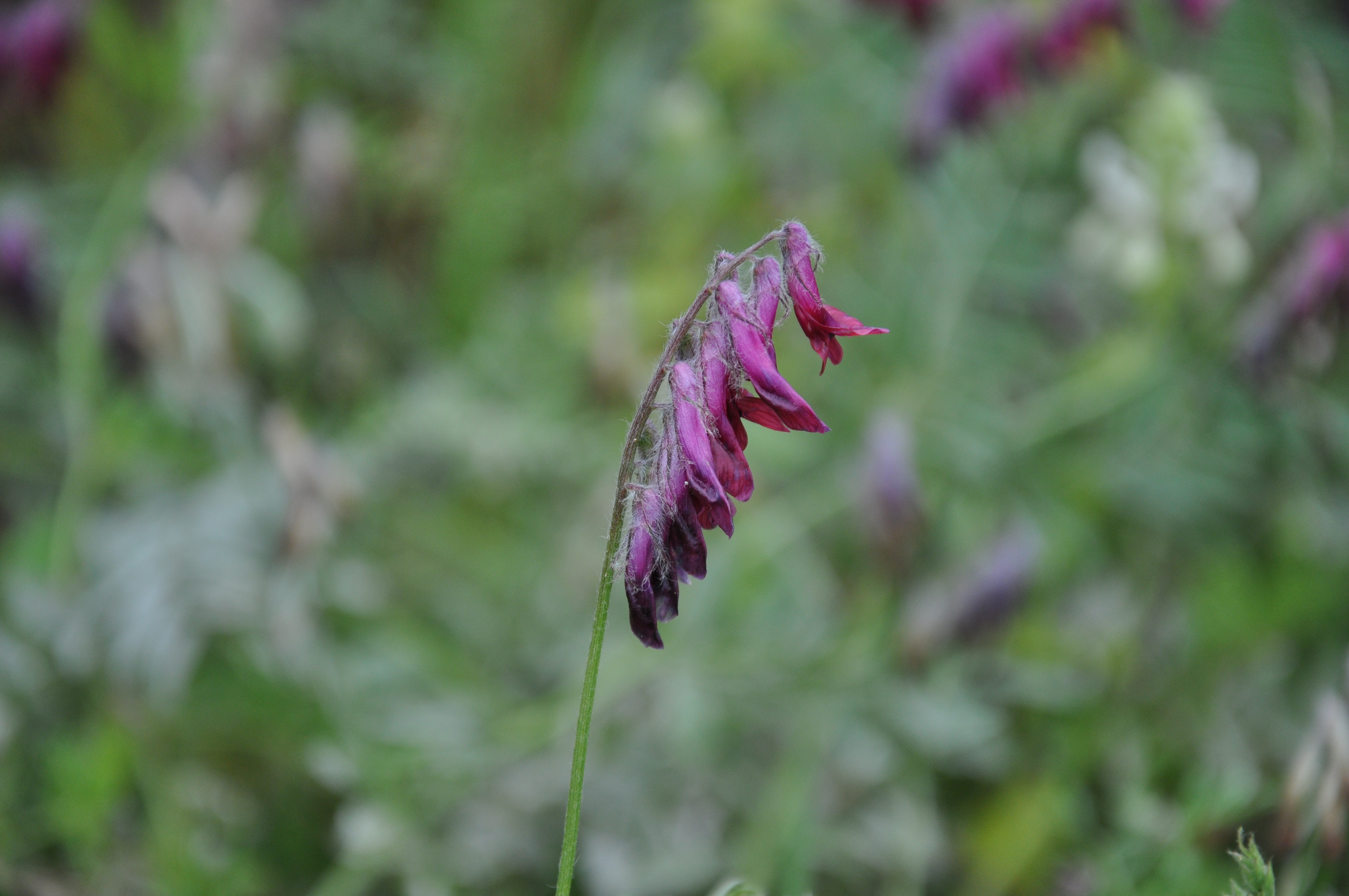 Arveja roja (Vicia benghalensis) en Ceuta, España.